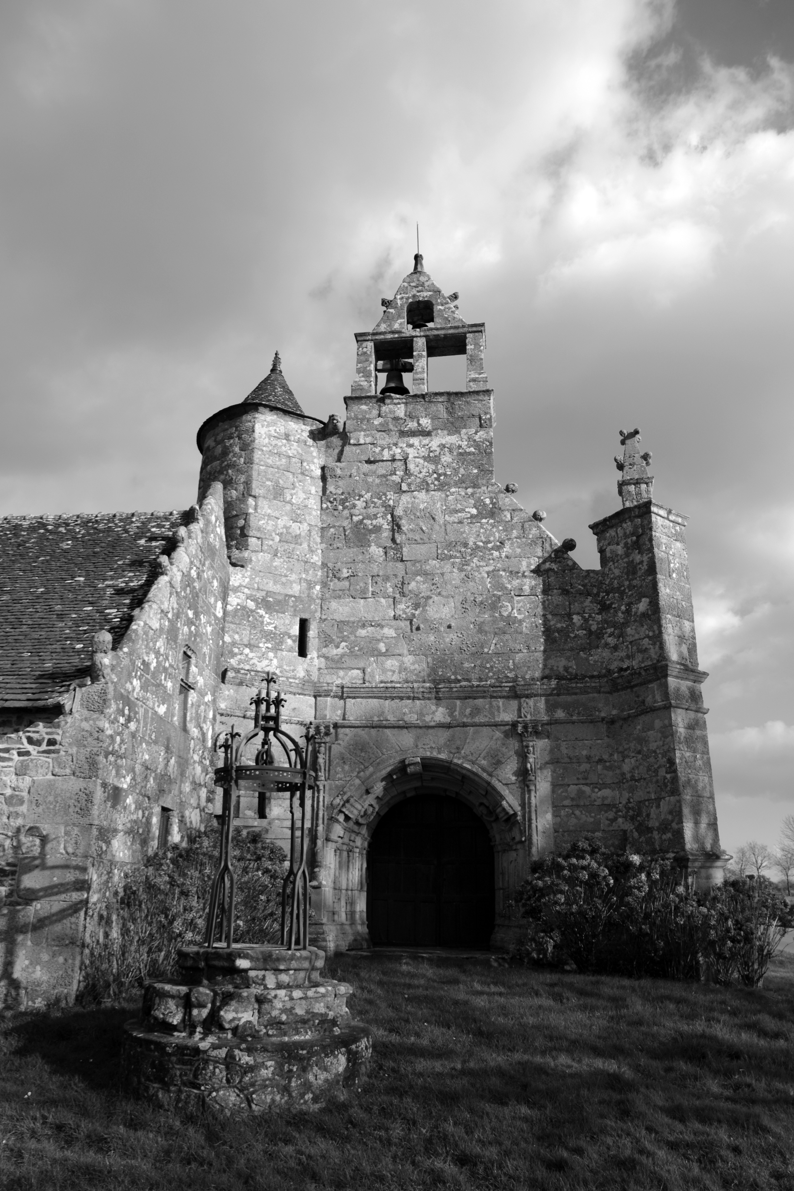 Chapelle Saint-Antoine, (Classement, 1913)